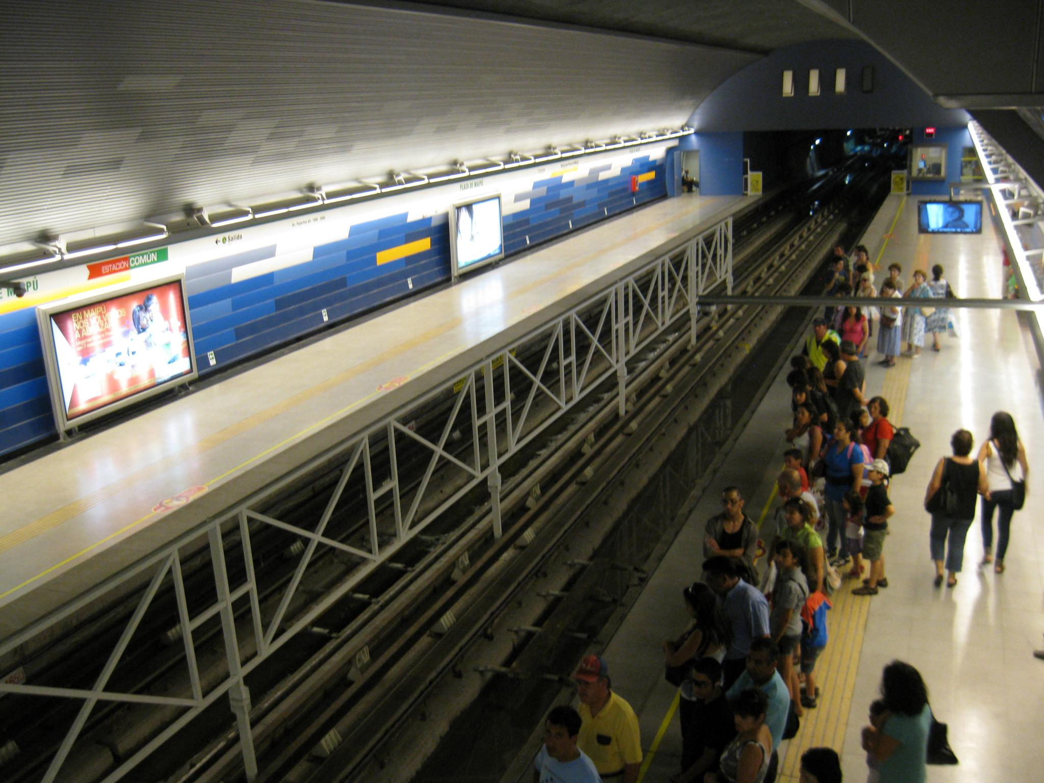 Extensión Poniente Línea 5: Febrero 2011